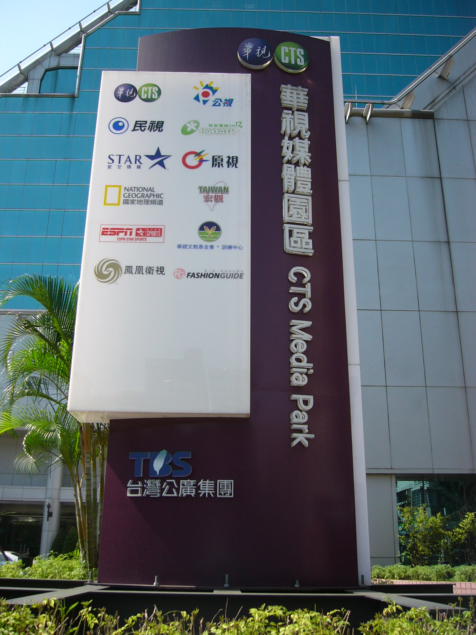 中華電視公司電視製作大樓大門外的華視媒體園區招牌，2013年1月重訪時已拆除。